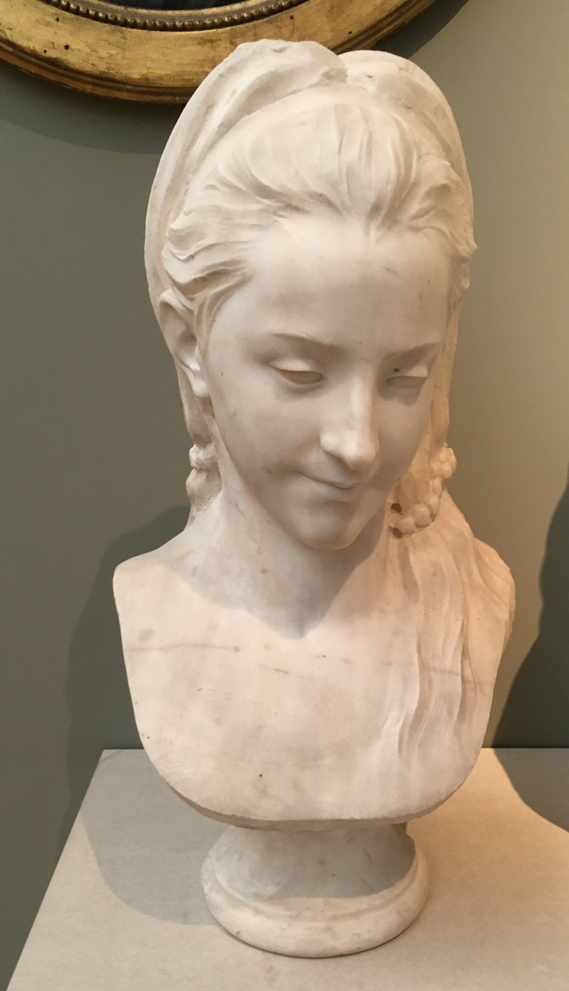 Marie-Anne Collot-Falconet, Buste de jeune femme ou Mary Cathcart, vers 1768-1772, marbre, 60 cm, Nancy, musée des Beaux-Arts, legs de la Baronne de Jankowitz en 1866.